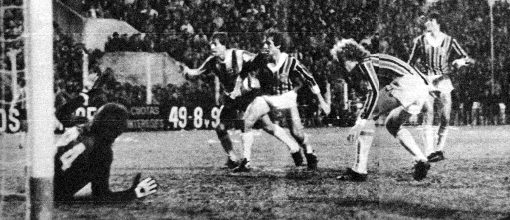 Nota completa da partida Estudiantes 3 - Grêmio 3. El Gráfico (12 de Julho de 1983) Edição 3327.